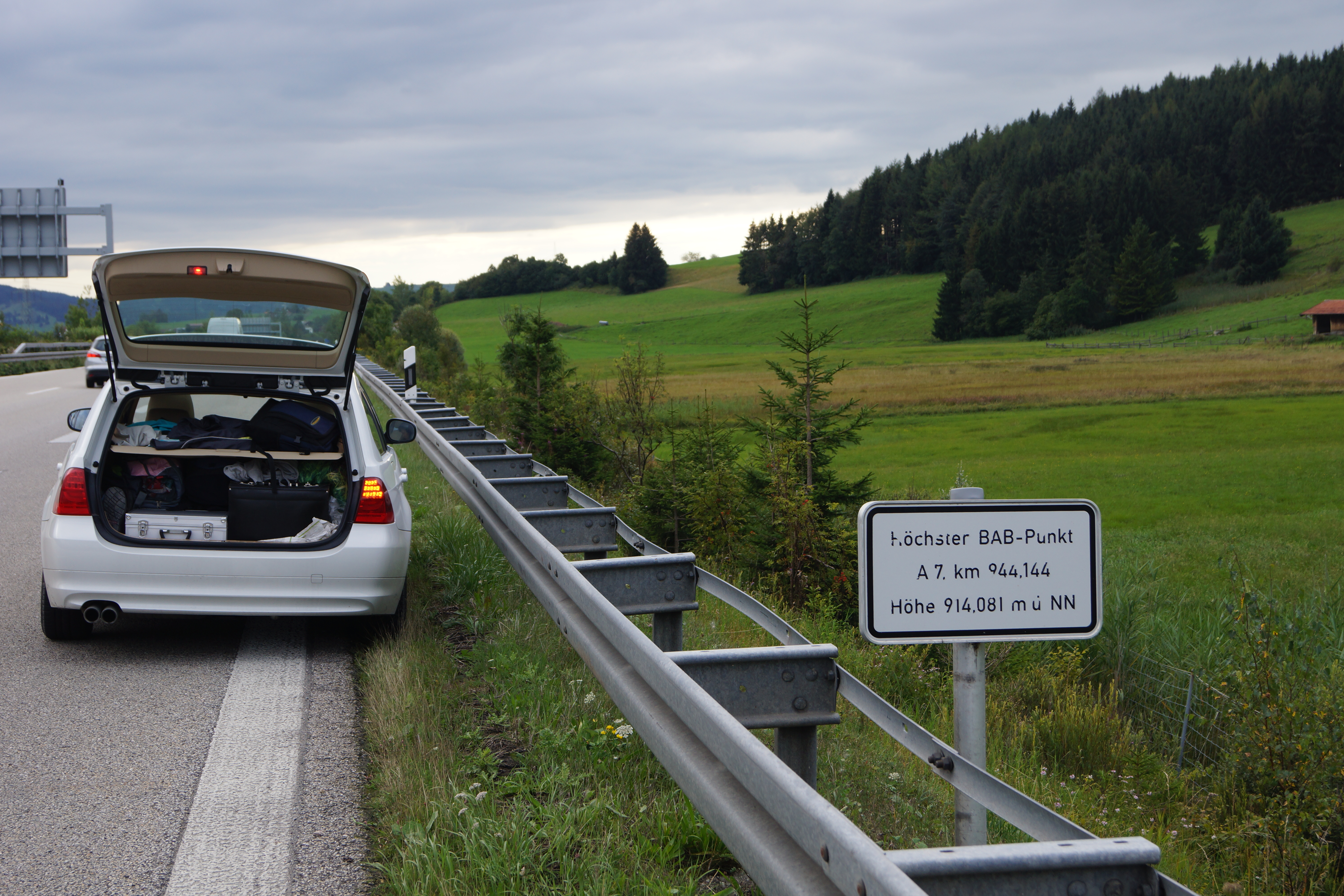 Germany Bavaria - Allgäu 914 m